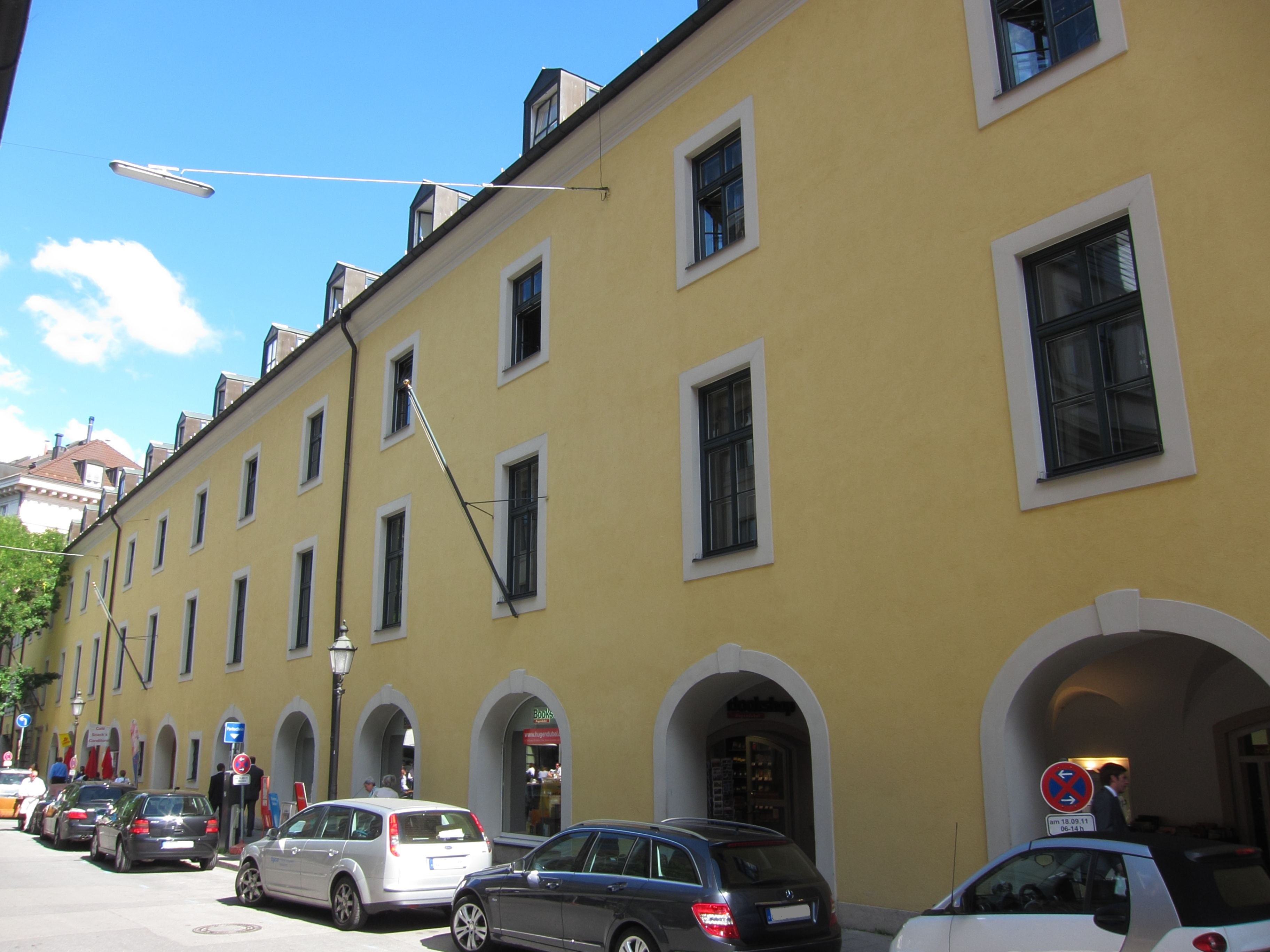 Salvatorplatz 2/2 a; Westteil des ehem. Theatinerklosters (siehe Theatinerstraße 20/21), jetzt Bayerisches Staatsministerium für Unterricht, Kultus, Wissenschaft und Kunst, langgestreckter Frühbarockbau, um 1675/76 von Lorenzo Perti, 1938-41 aufgestockt und umgebaut; südlich anschließend spätbarocker Eckbau von ca. 1731, Teil des ehem. Palais Minucci, um 1939 umgebaut.